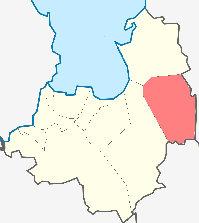 Шумское сельское поселение Кировского района Ленинградской области.